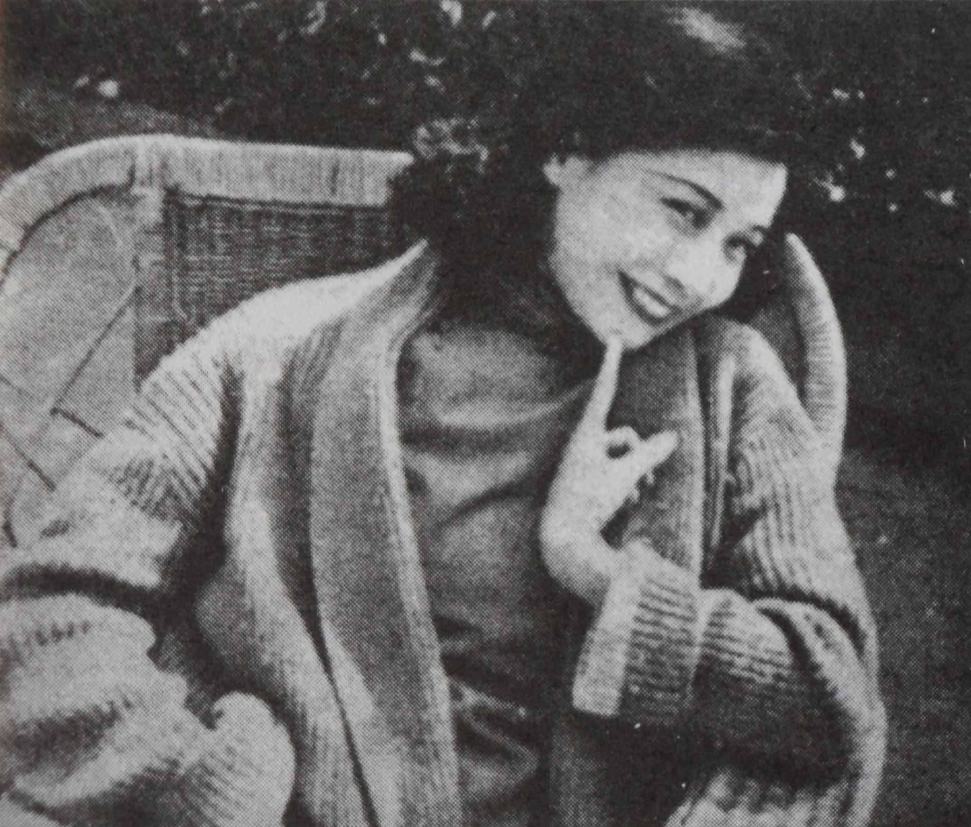 中国1930年代女影星阮玲玉